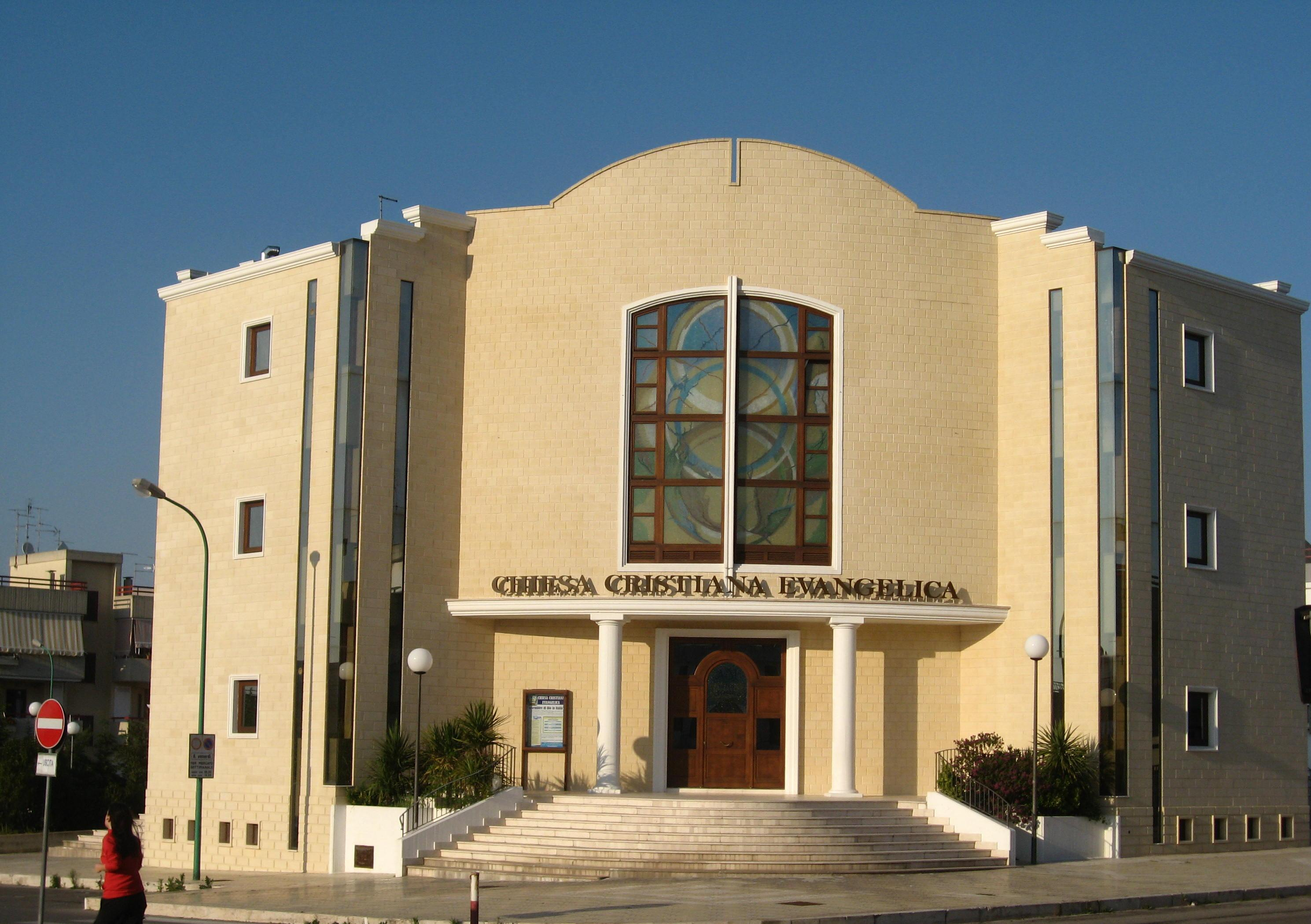 By Stefano Piepoli & Carmine Lentini